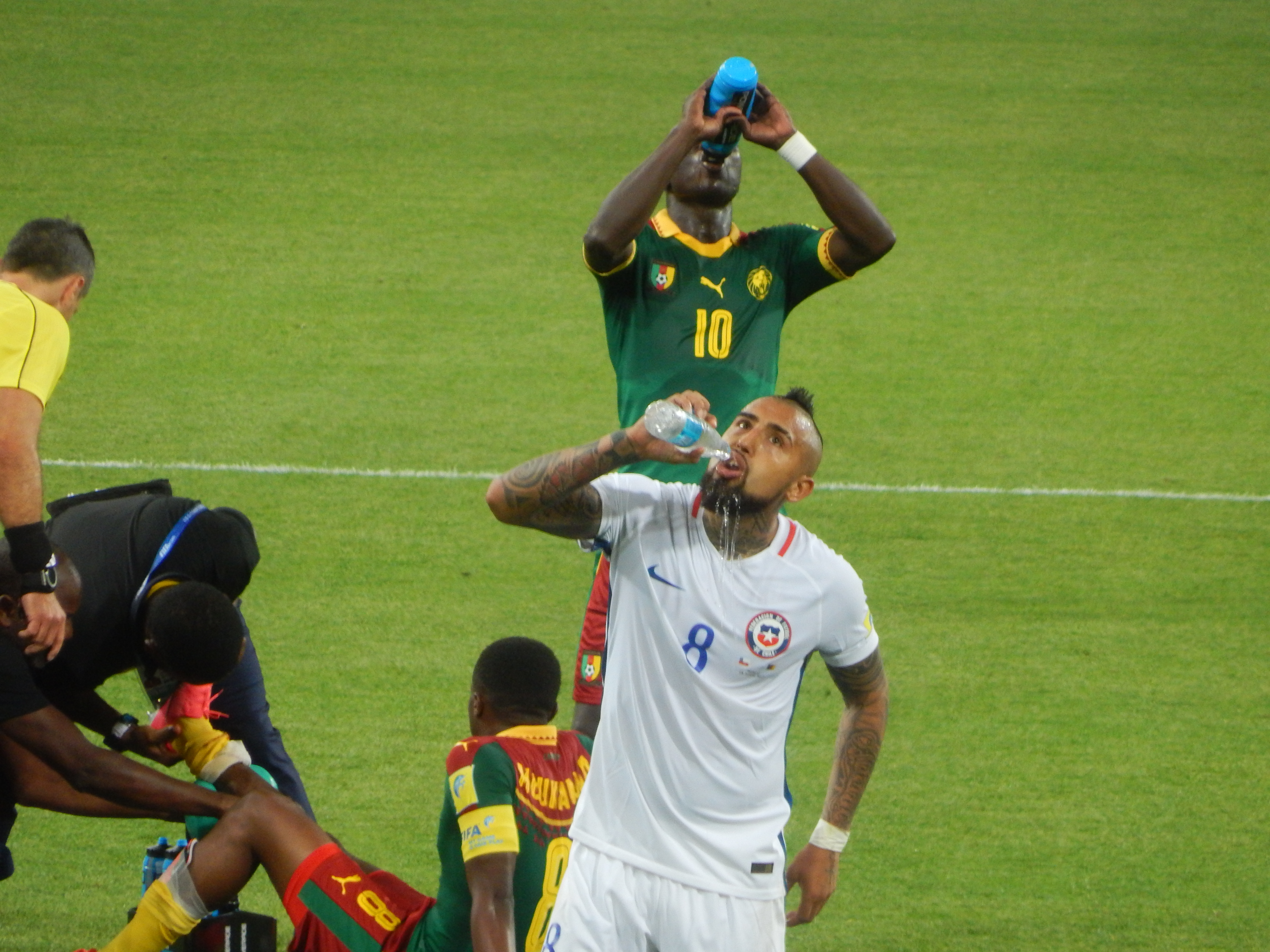 Артуро Видаль и Венсан Абубакар во время травмы Бенжамена Муканджо